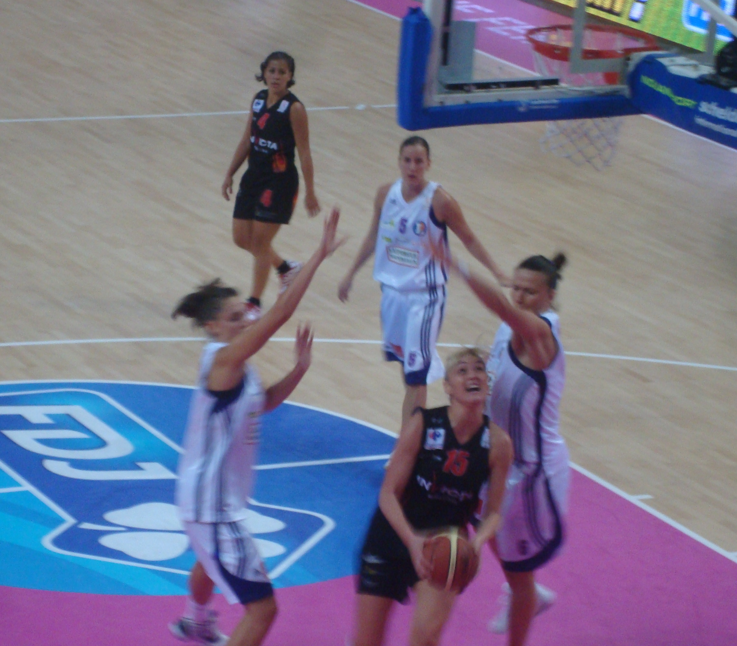 la basketteuse serbe Bojana Vulic à l'Open LFB.